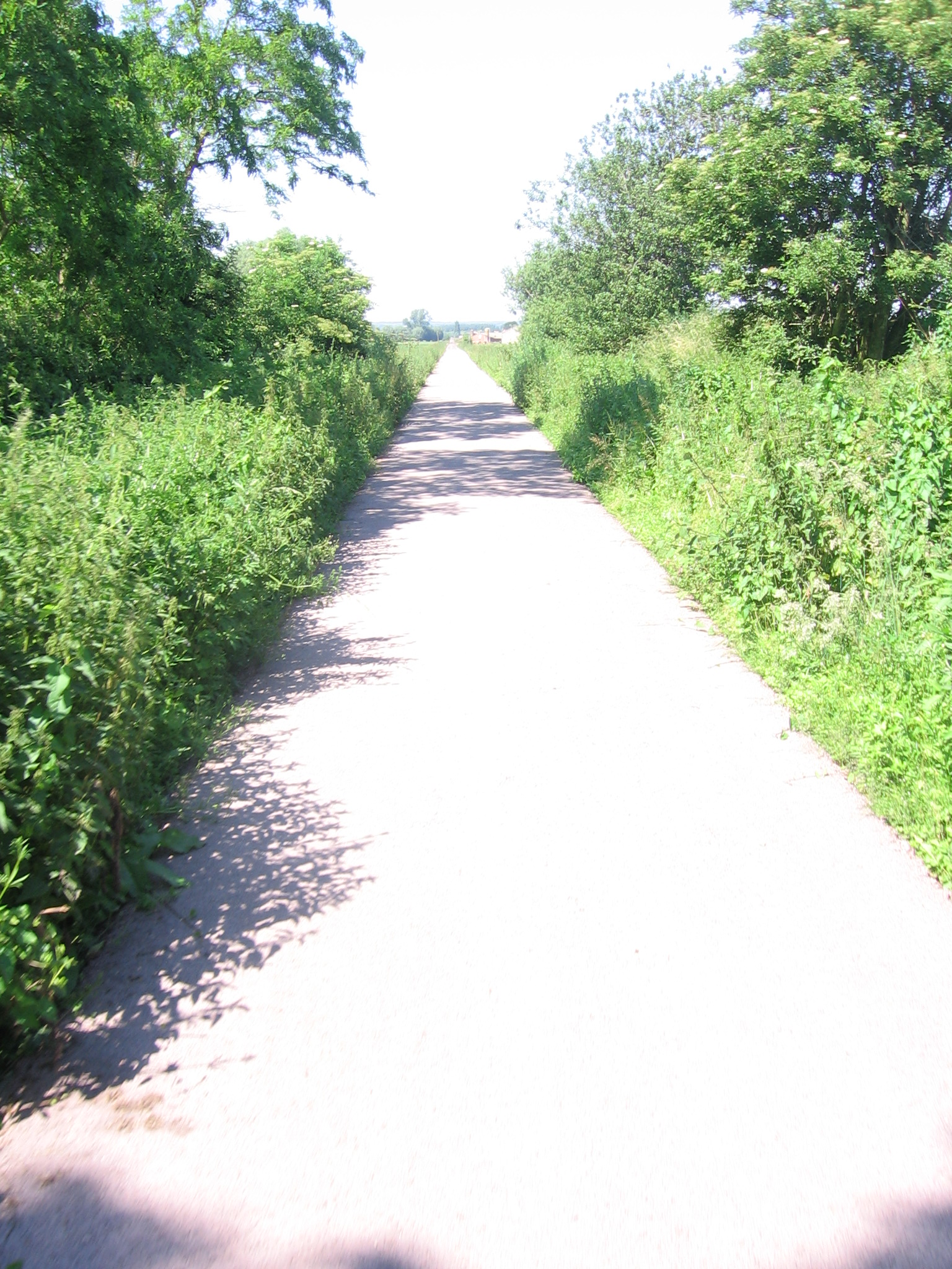 Foto zelf genomen, juni 2006, ter hoogte van De Geite/Sint-Jozef, Hooglede